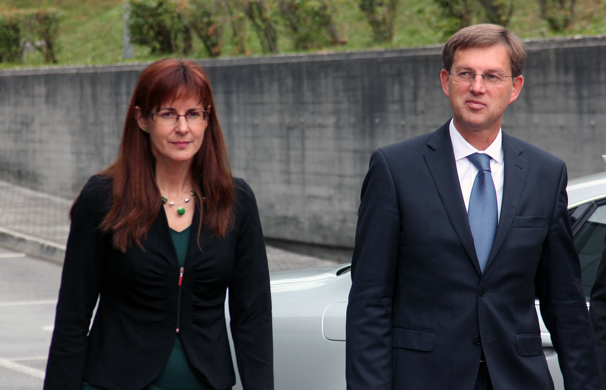 Predsednik vlade ob dnevu državnosti prek videokonference nagovoril pripadnike slovenskih kontingentov na misijah v tujini.